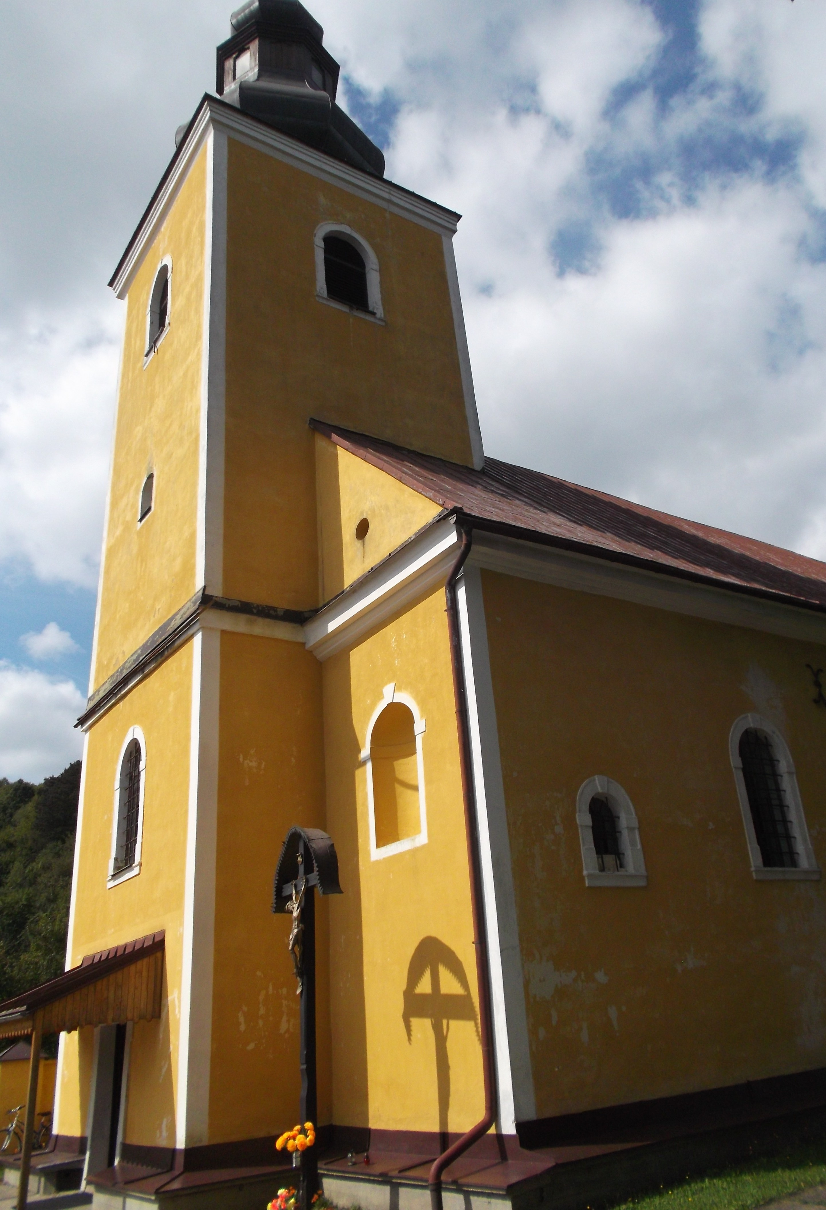 Kostol